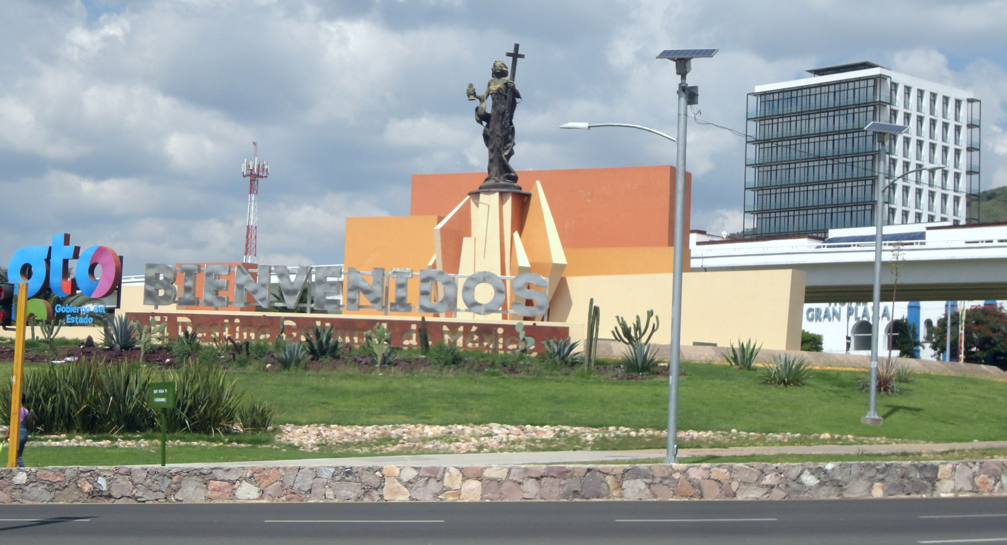 Glorieta Santa Fe, Guanajuato Capital, Guanajuato, México.